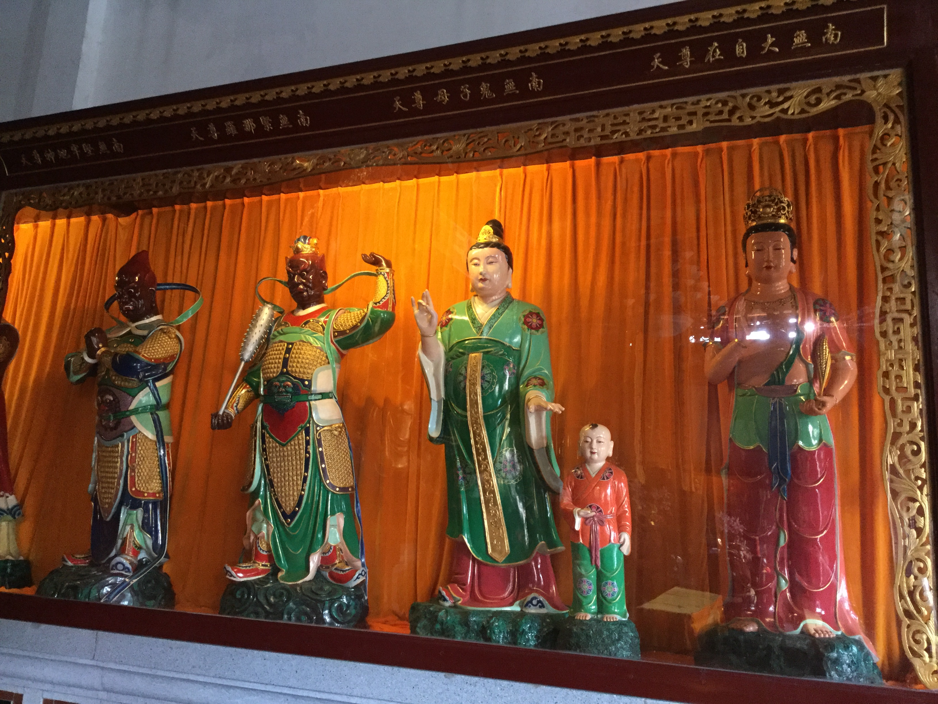 汕头天坛花园